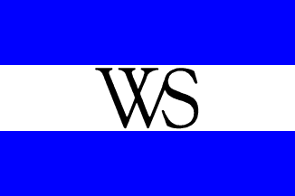 Vlag gemeente Weesp